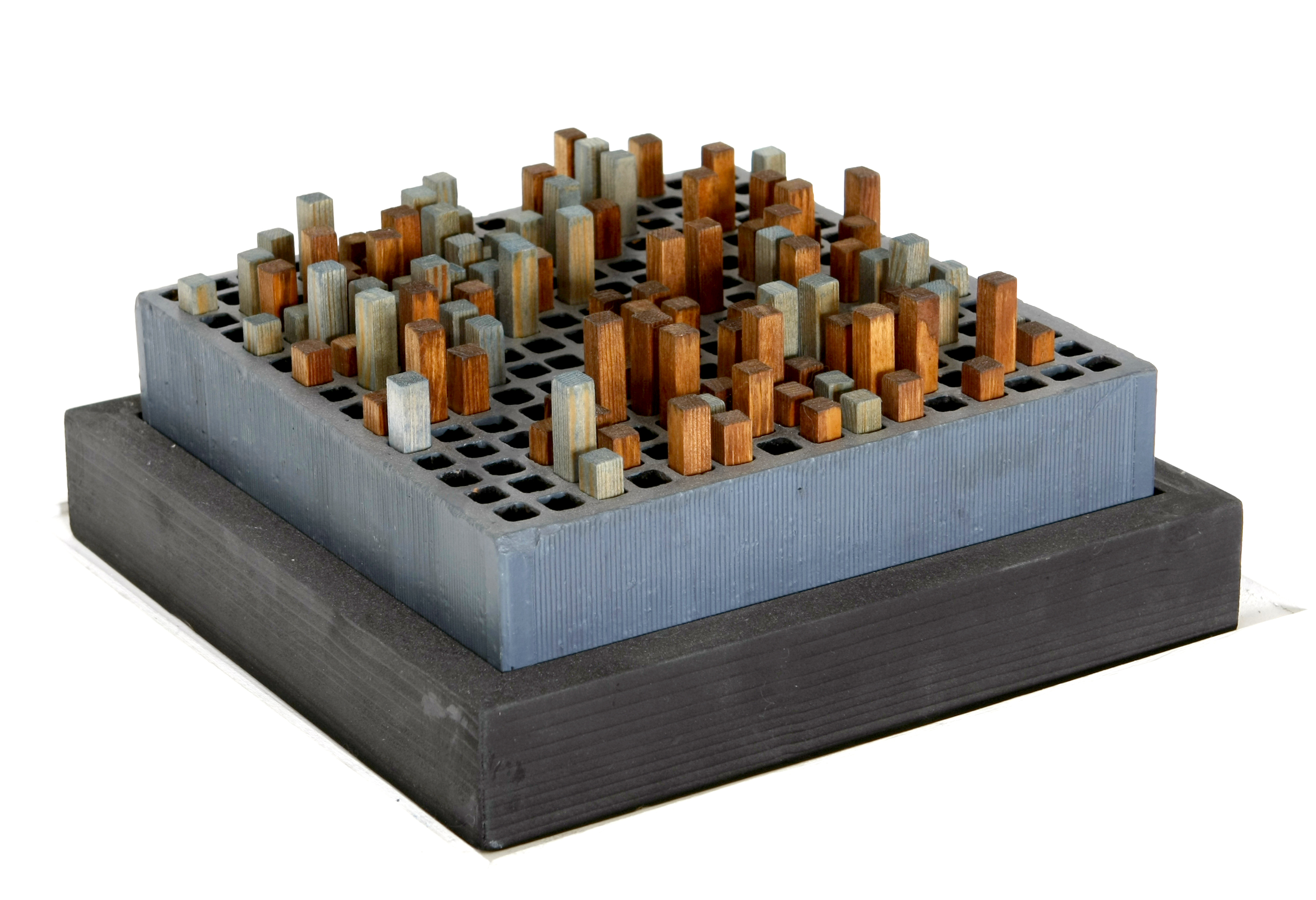 Jox Reuss,Manhattan,1964,Steckobjekt, zweifarbige Holzpfeiler grau und rostrot in Zierstein